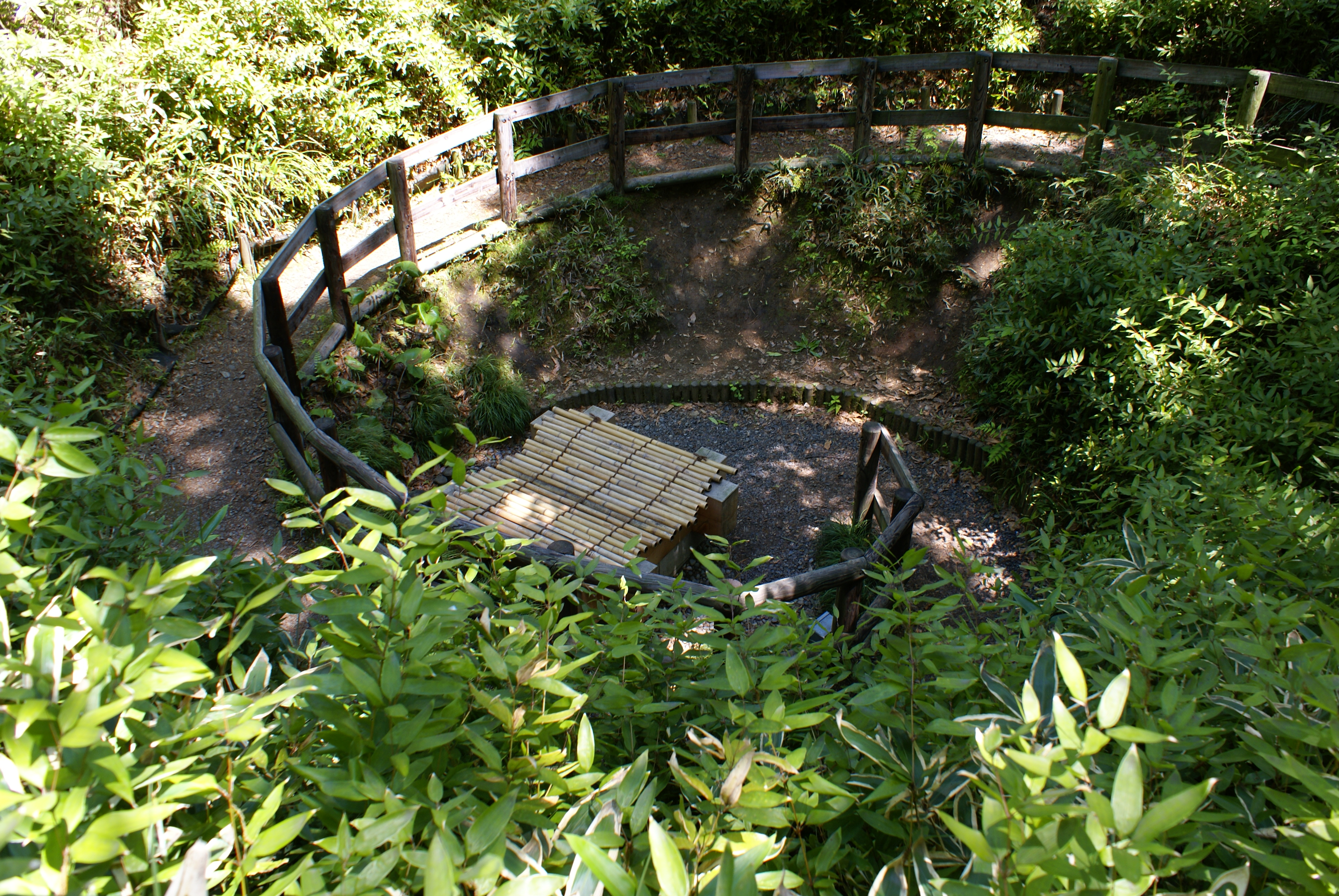 maimaizu ido at Fuchushi Kyodo no mori museum, Fuchi, Tokyo